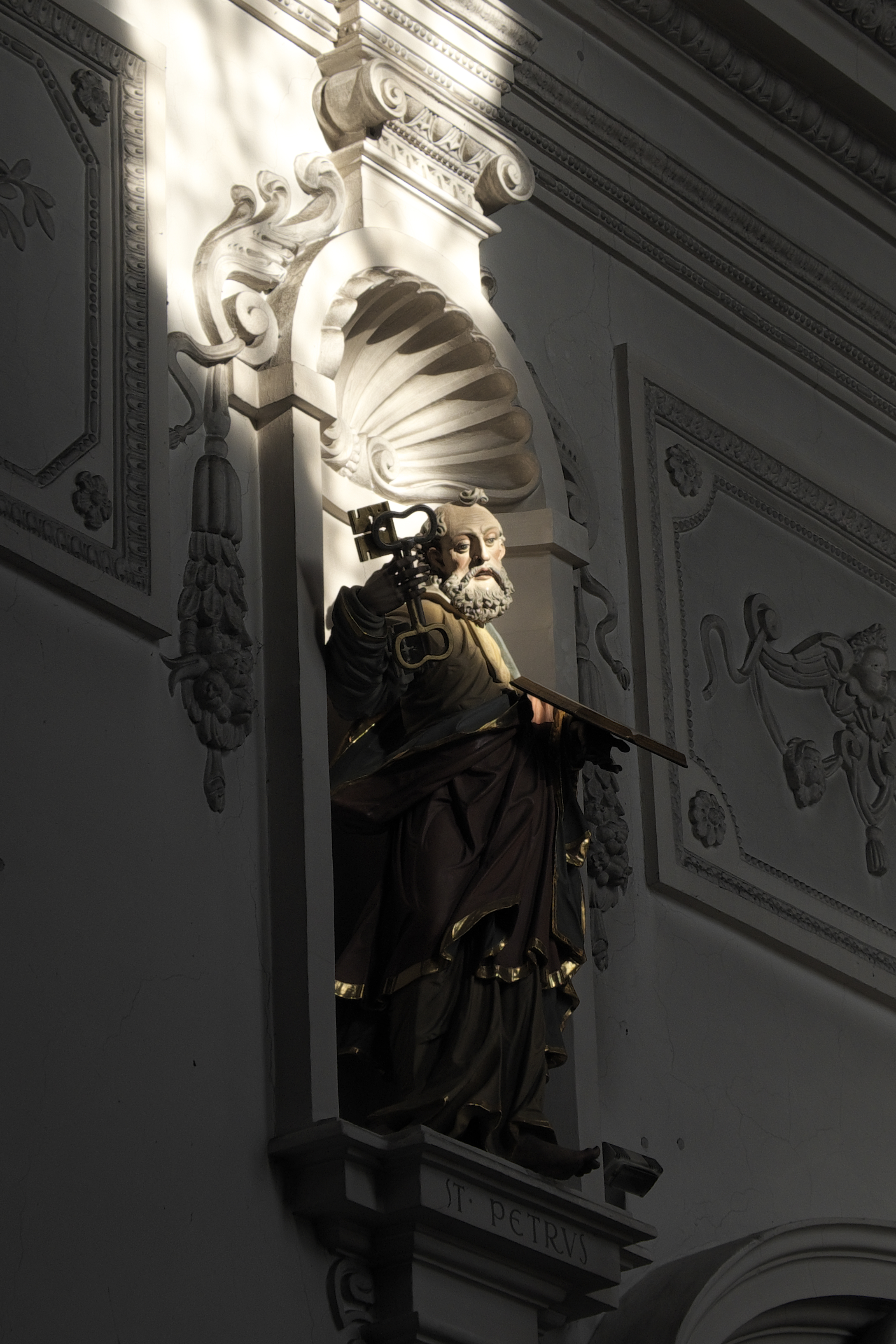 Katholische Pfarrkirche St. Johannes Baptist in Pfaffenhofen an der Ilm (Bayern/Deutschland), Figur des Apostels Petrus